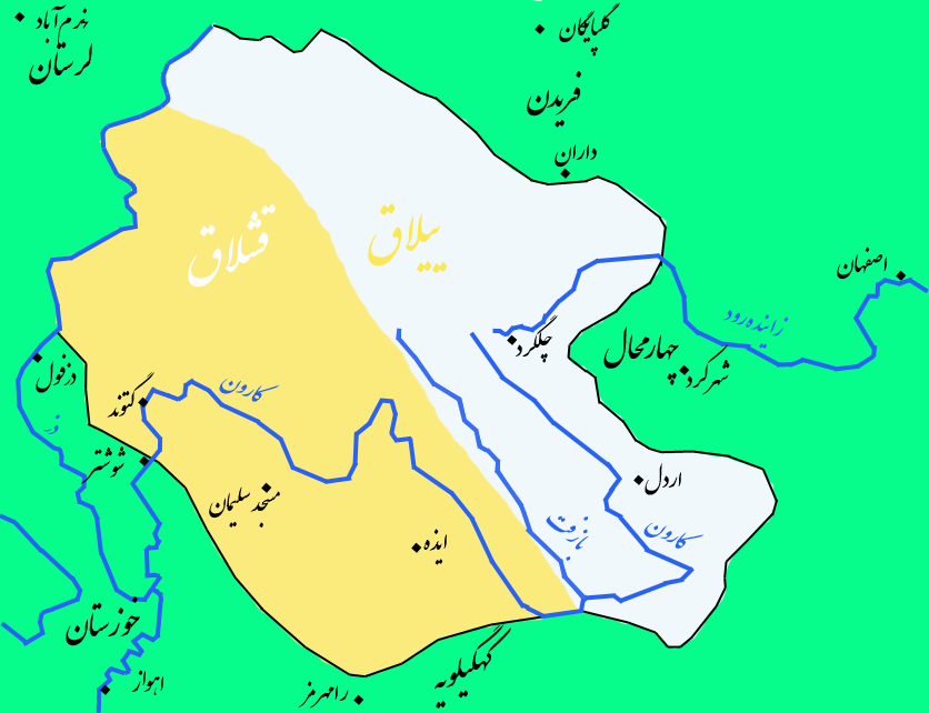 محدوده سرزمین بختیاری‌ها بر اساس دانشنامه ایرانیکا